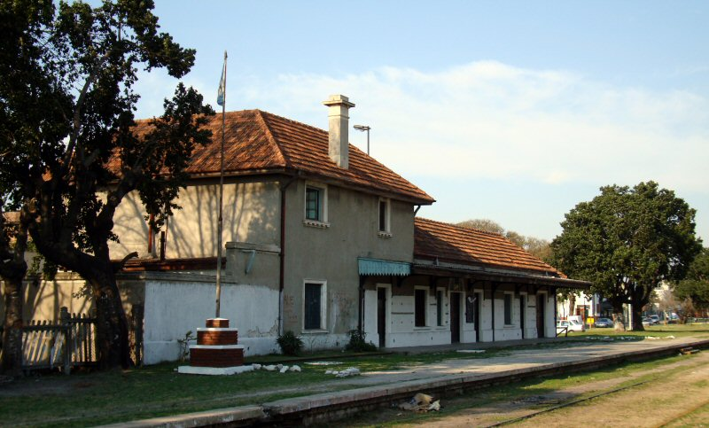 Estación Circunvalación, FCGR